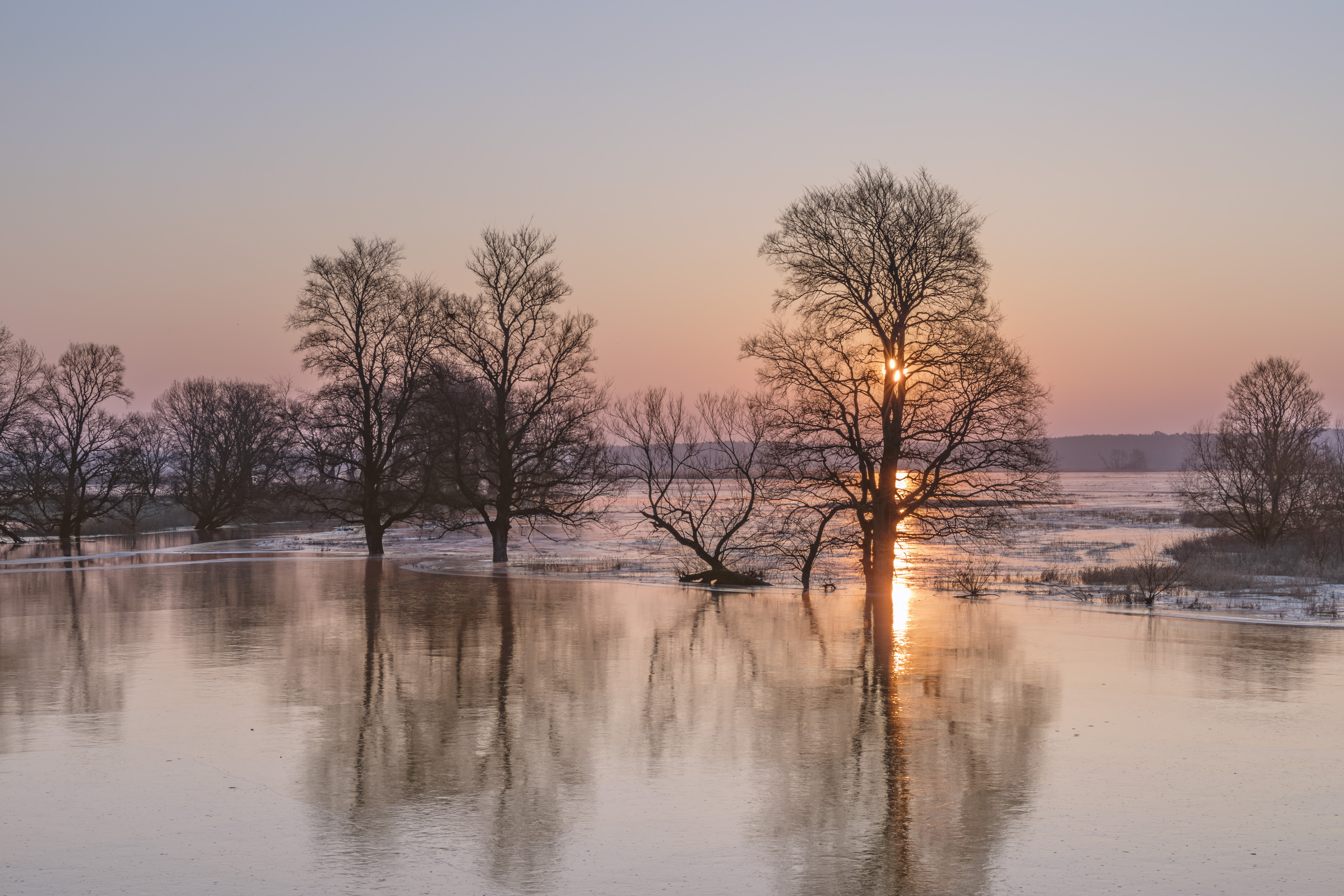 Im Winter sind diese Polder geflutet, der Fluss hat Platz sich auszubreiten. Im Sommer werden die Polder als Wiesen genutzt.